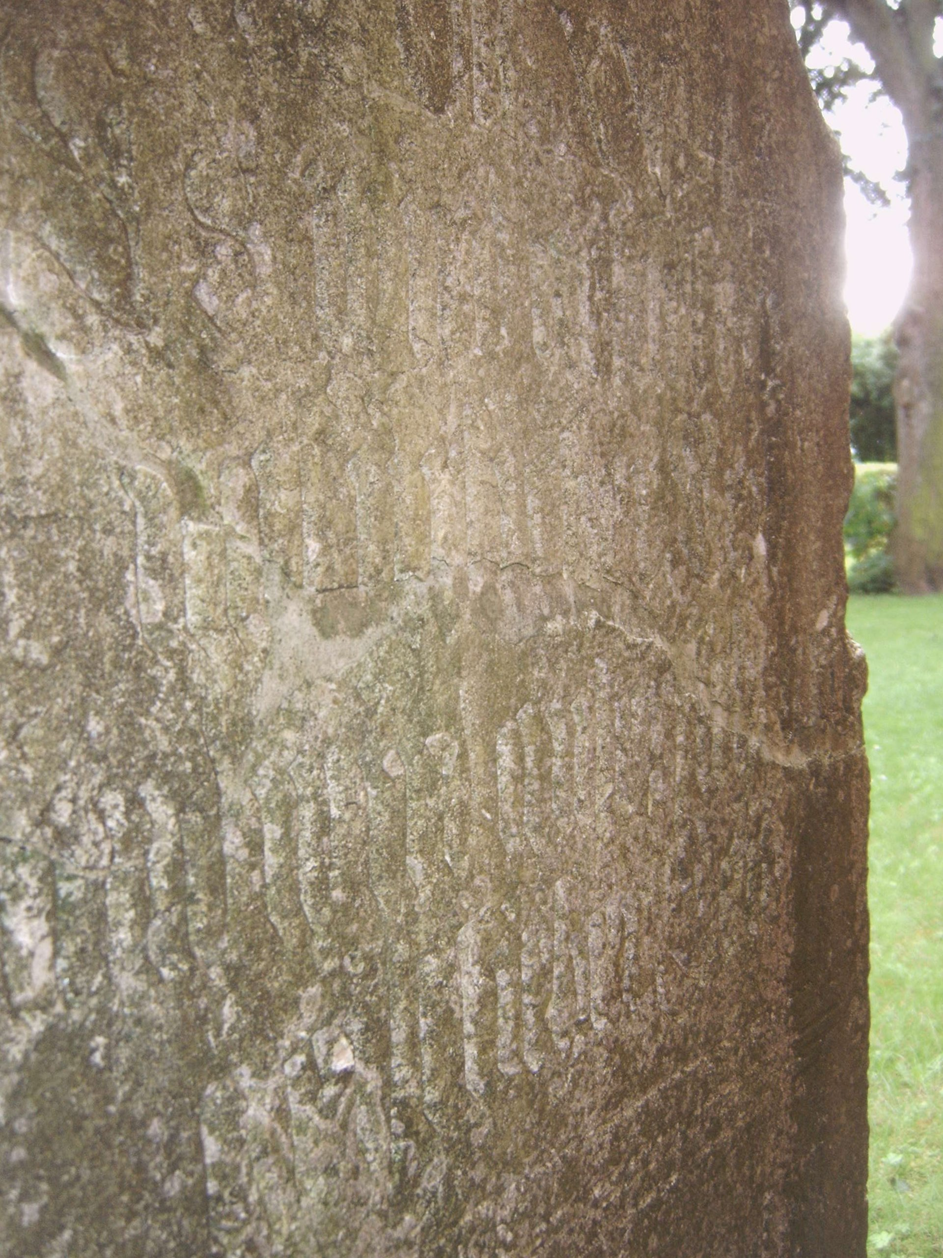 Sühnestein in Gingst (Rückseite des heutigen Grabsteins), Rügen, Deutschland